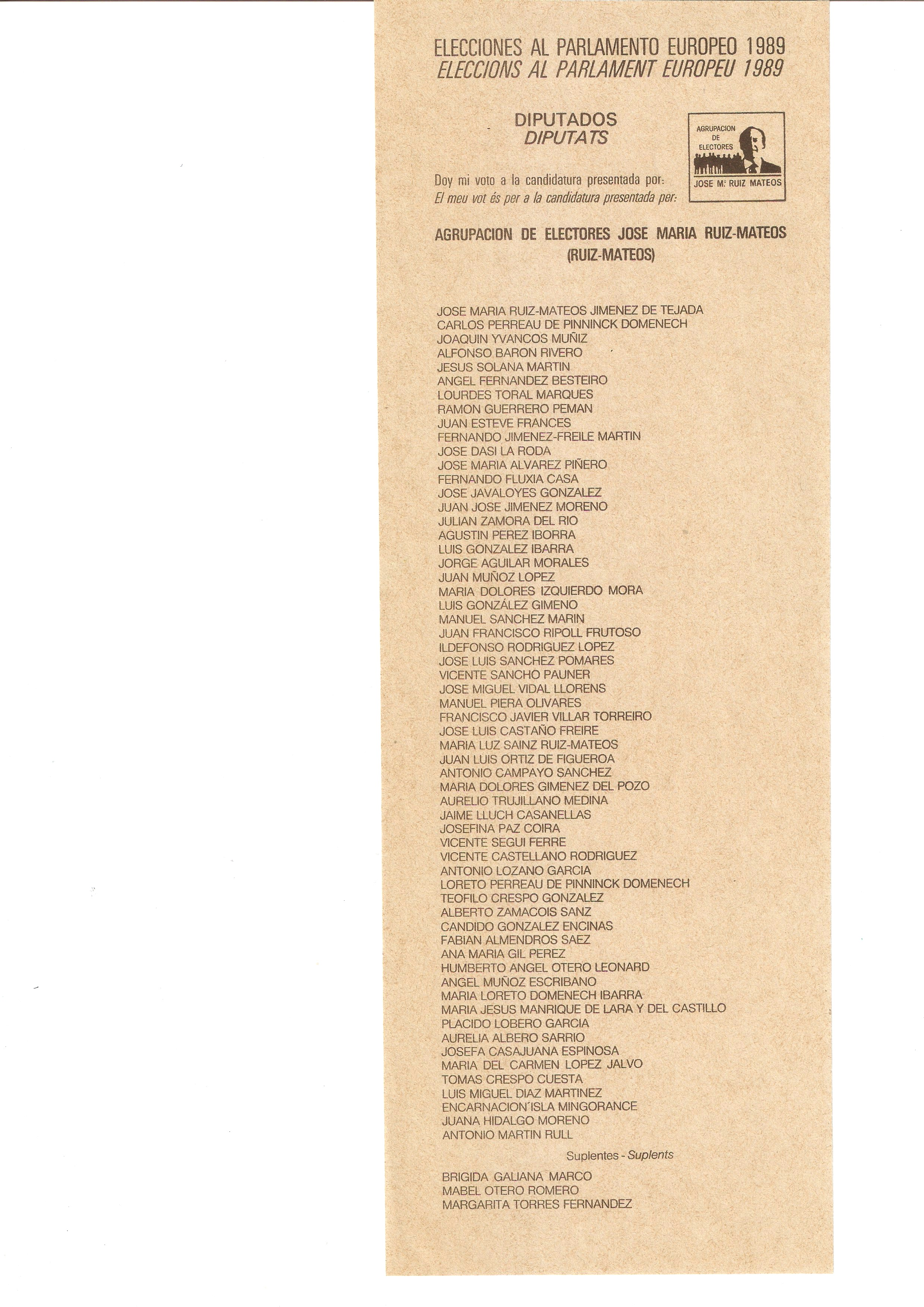 Papeleta de Agrupación Ruiz Mateos para las elecciones al Parlamento Europeo de 1989, distrito España. Versión para la Comunidad Valenciana.